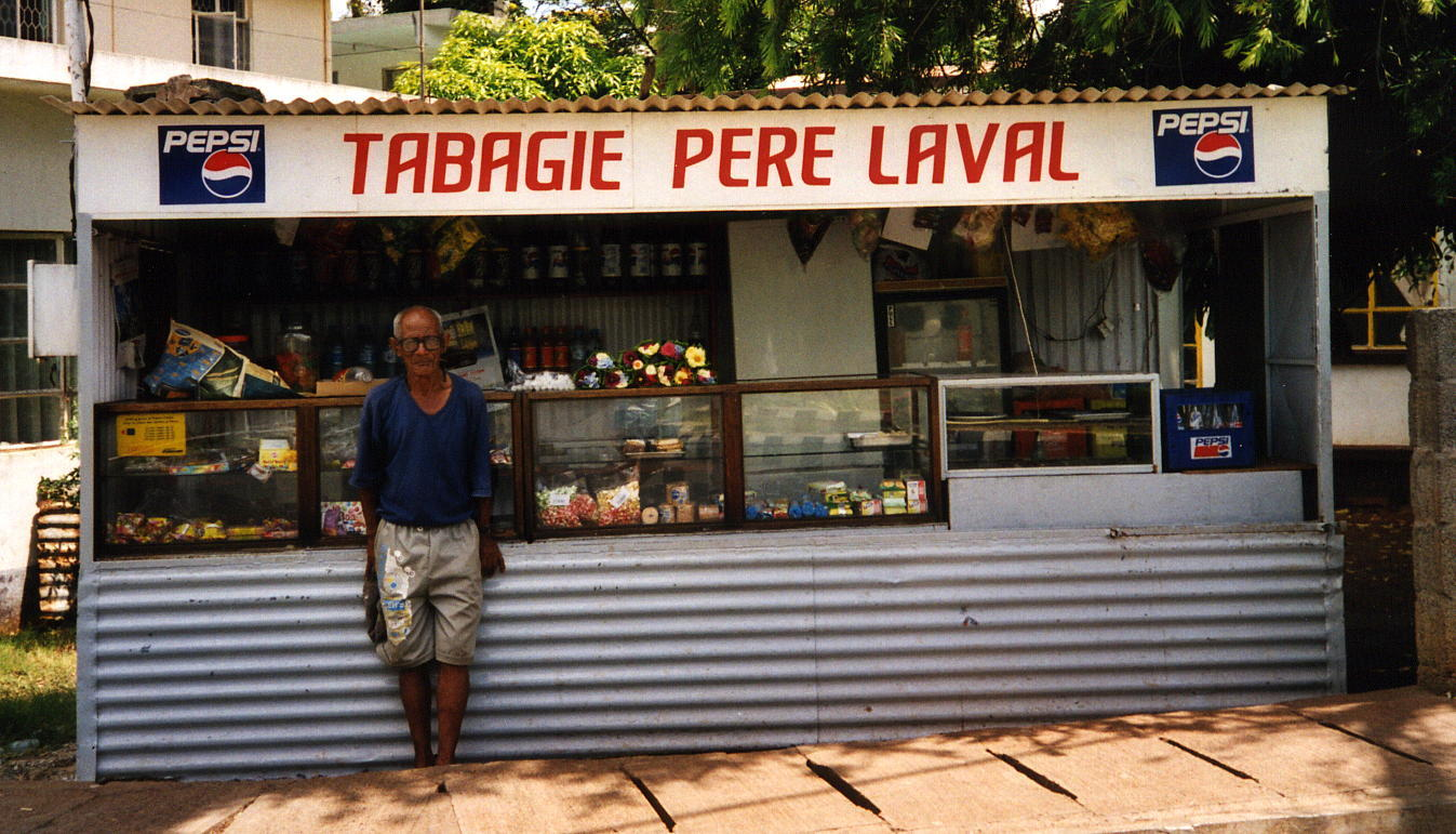 Photographie personnelle de Benoît Smerecki (sblaval). Elle peut être utilisée librement.